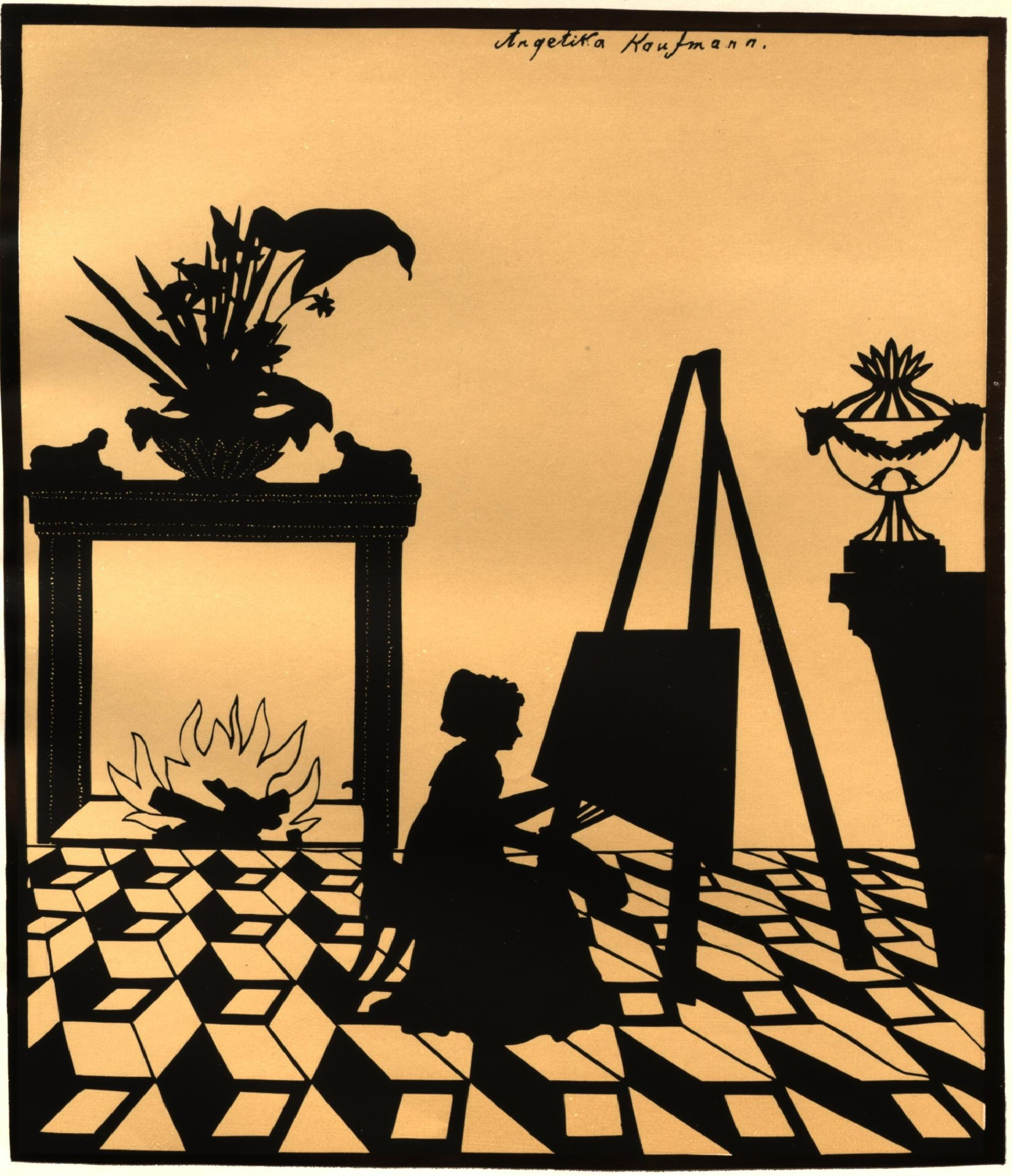 Luise Duttenhofer: Angelika Kauffmann in ihrem Atelier in Rom, schwarzer Scherenschnitt, gelb hinterlegt, um 1804/1805.